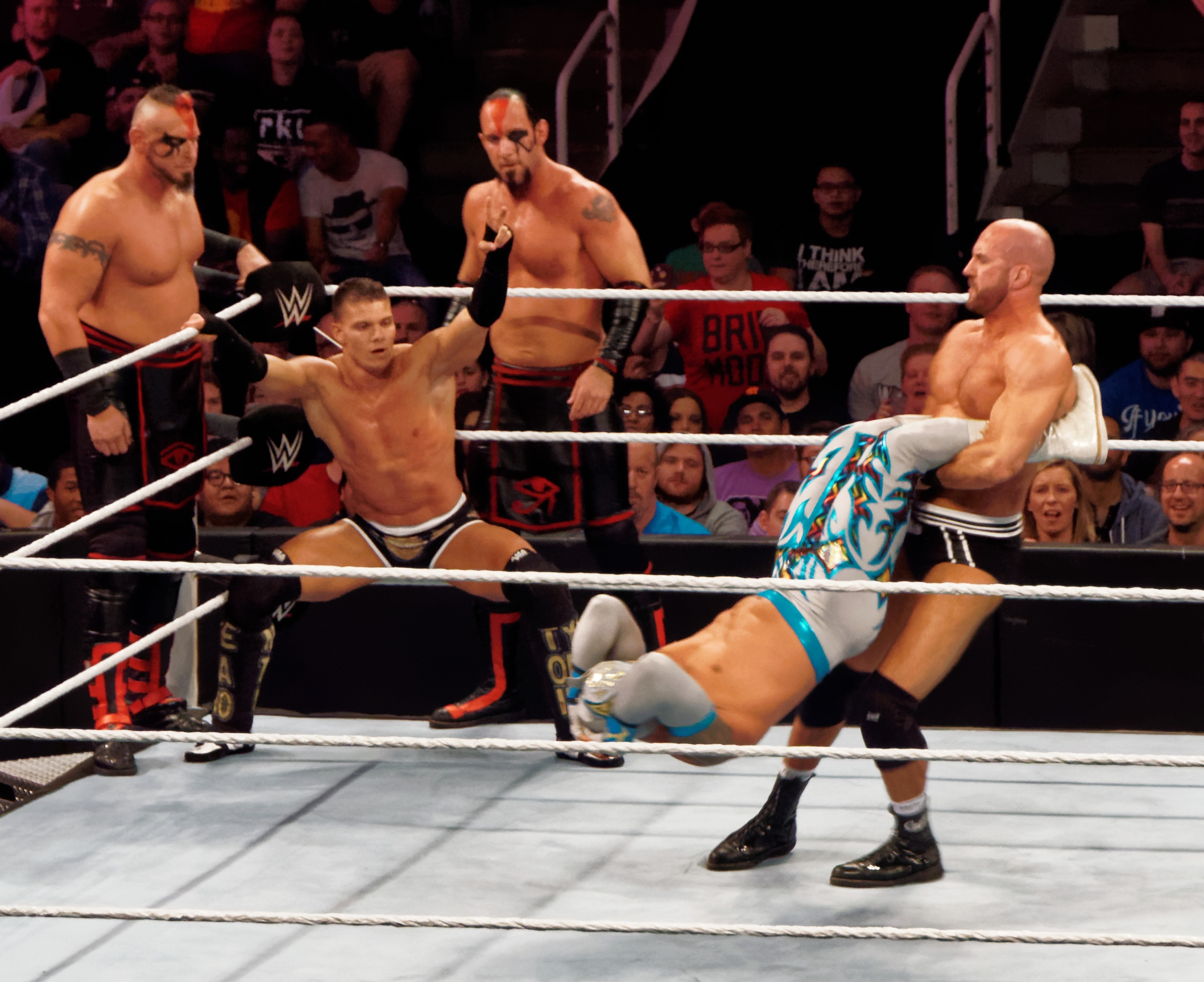 2015-03-30_17-51-51_ILCE-6000_1303_DxO